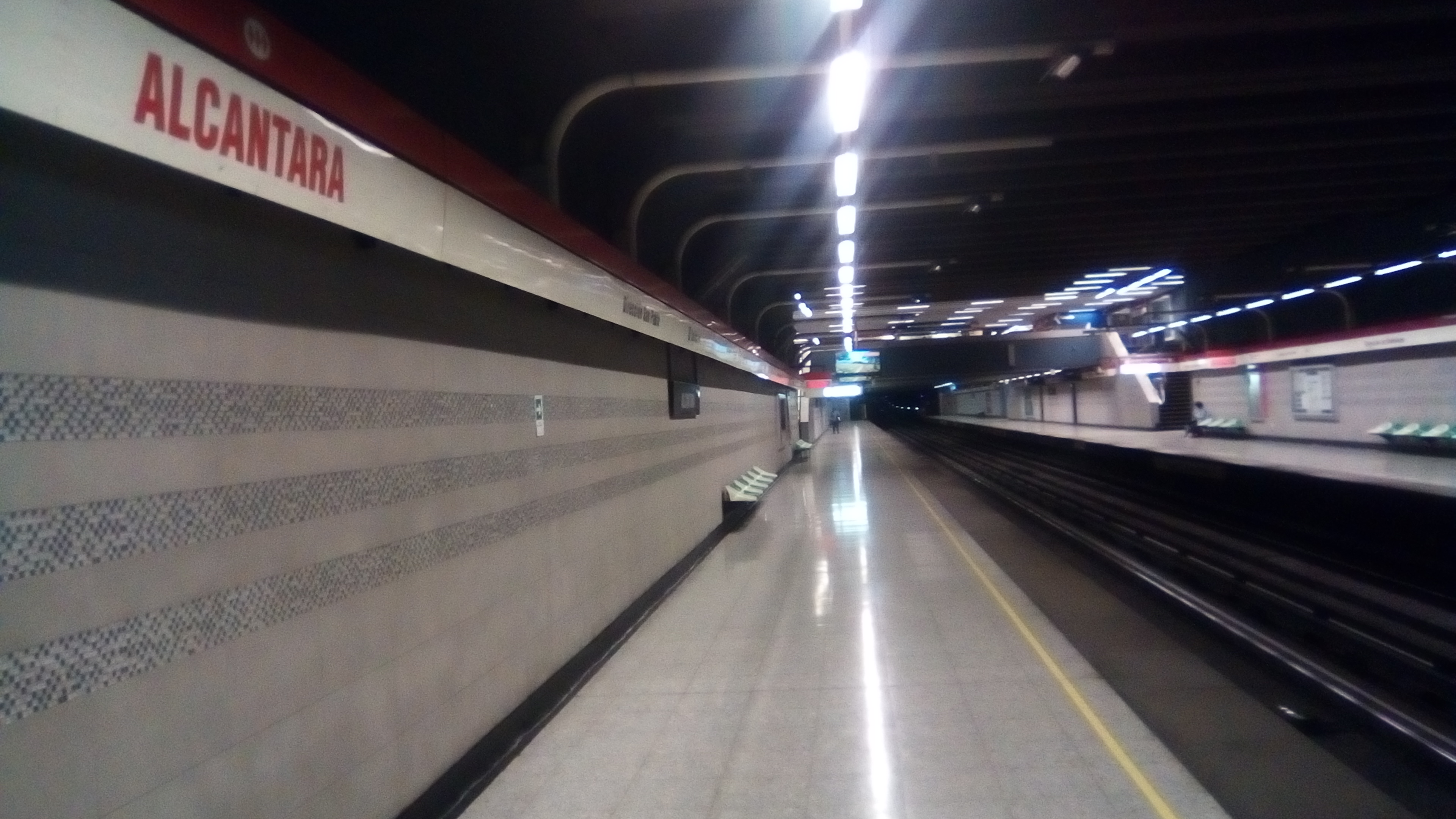 Estación Alcantara (2018)